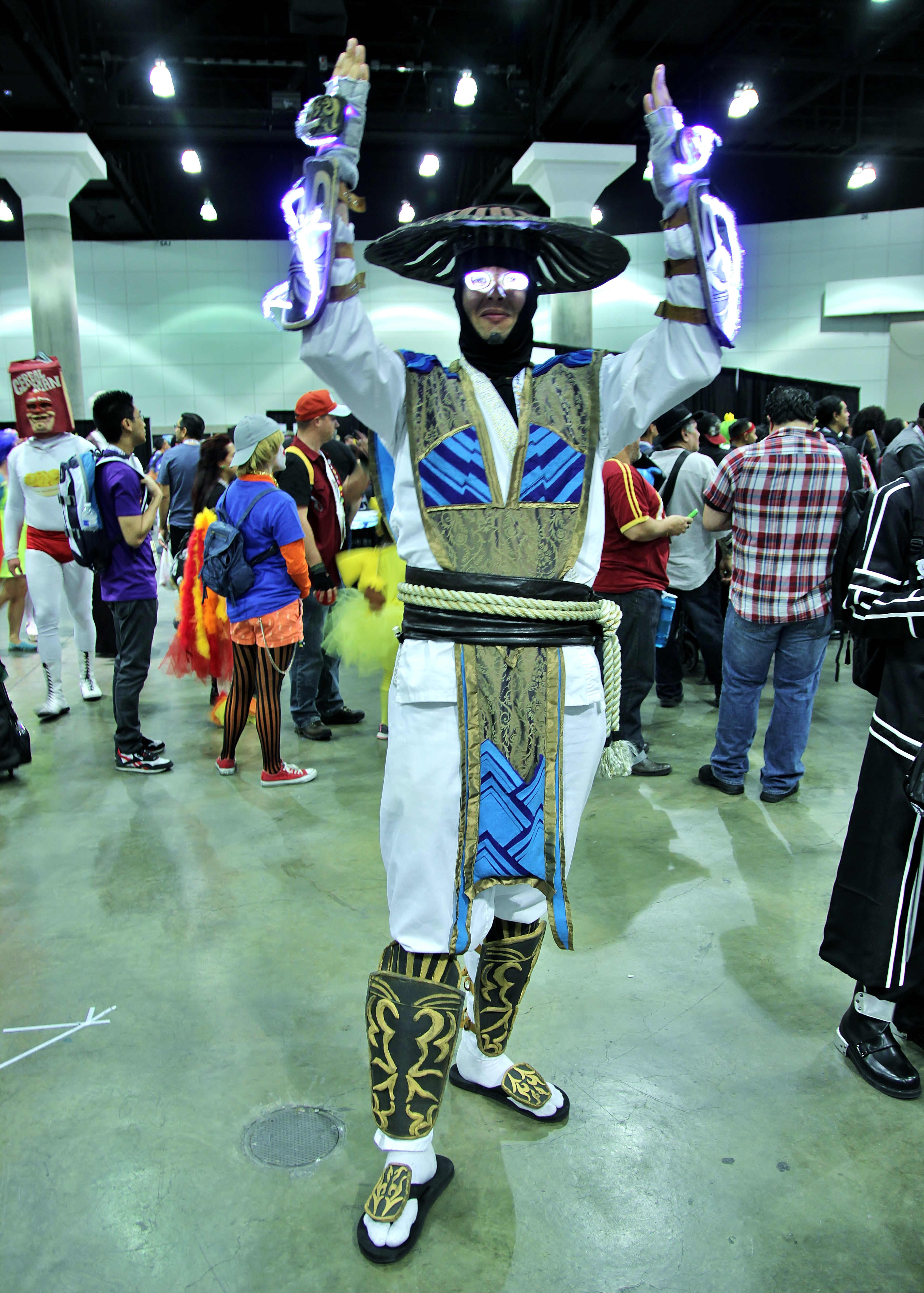 Cosplay at Comikaze Expo 2015.